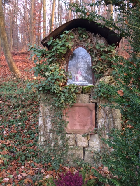 Pietà-Darstellung in der Nähe der Laurentiuskirche in Werbachhausen.